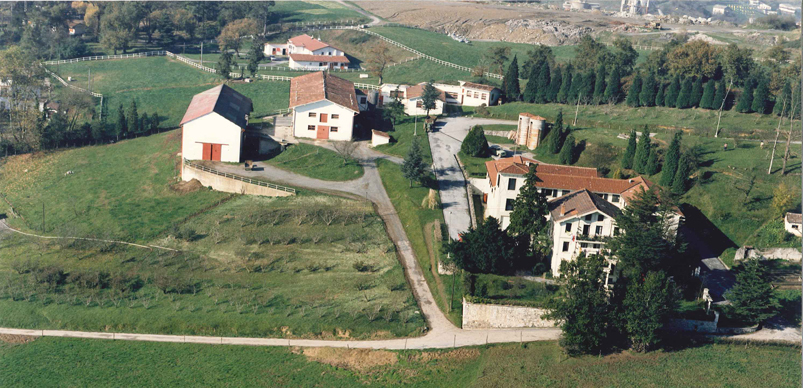 50eko hamarkadaren amaieran sortu zen Zabalegi Nekazaritza Eskola, nekazaritza eta abeltzaintzako trebakuntza-zentro bat izateko beharra zegoela jabetuta. Urte askoan, eskolak Gipuzkoako baserritarrentzako hainbat trebakuntza- eta sustapen-ekintza garatu zituen, baina Arkaute, Derio eta Fraisoroko granja modeloak zirela eta, bertako ekintza jeisten joan zen.